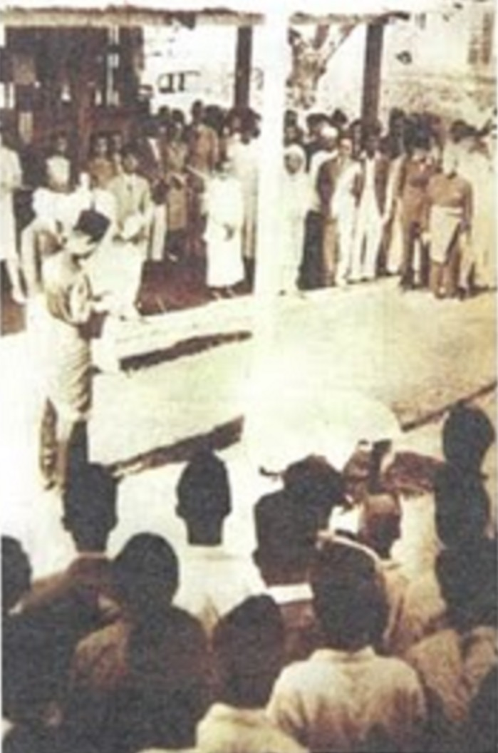 Ahmad Tajuddin menaikkan bendera dalam Sambutan Ulang Tahun BARIP yang pertama